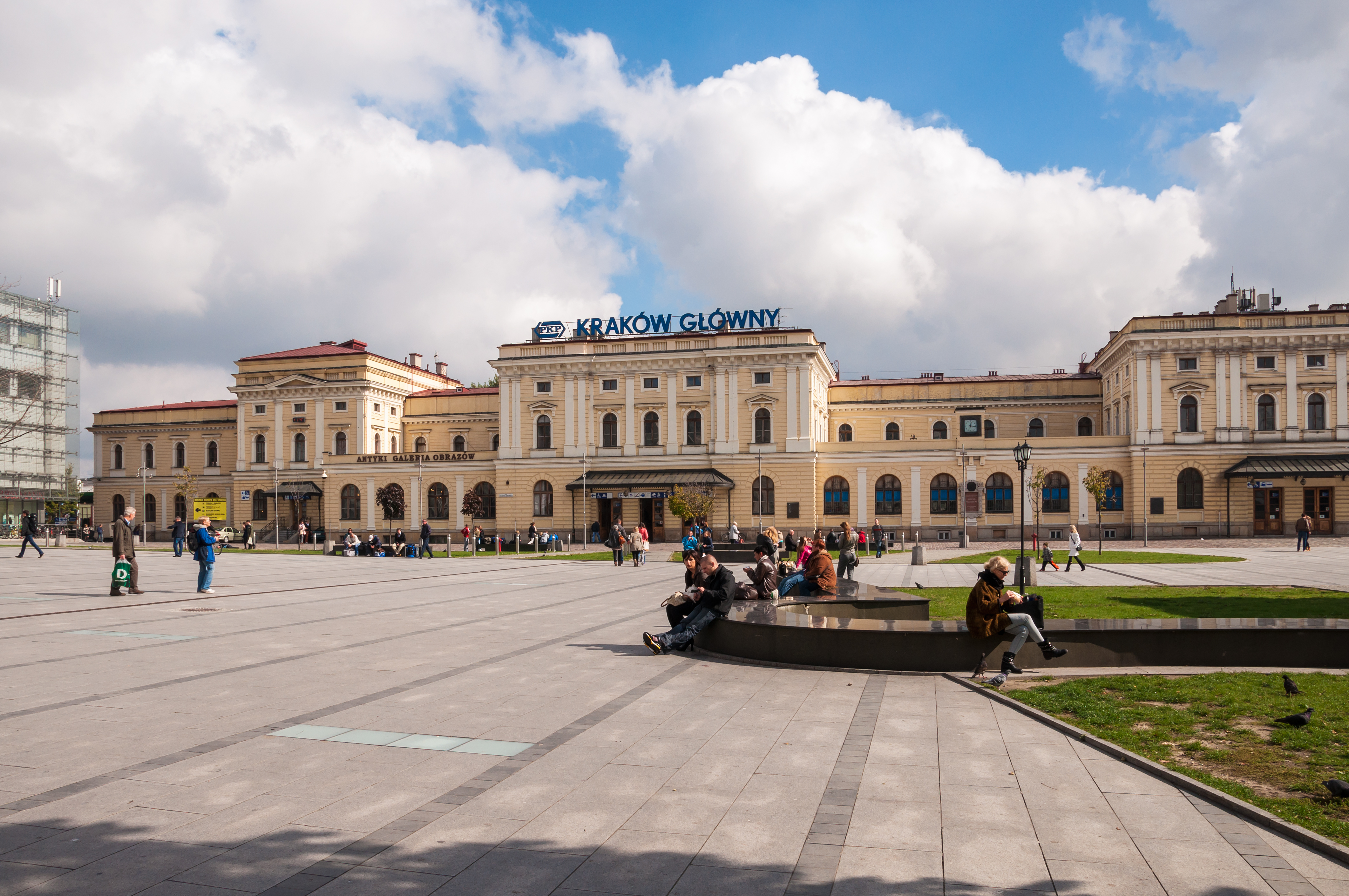 Kraków, ul. Lubicz / pl. Kolejowy. Dworzec PKP, 1844-1847, ok. 1880.